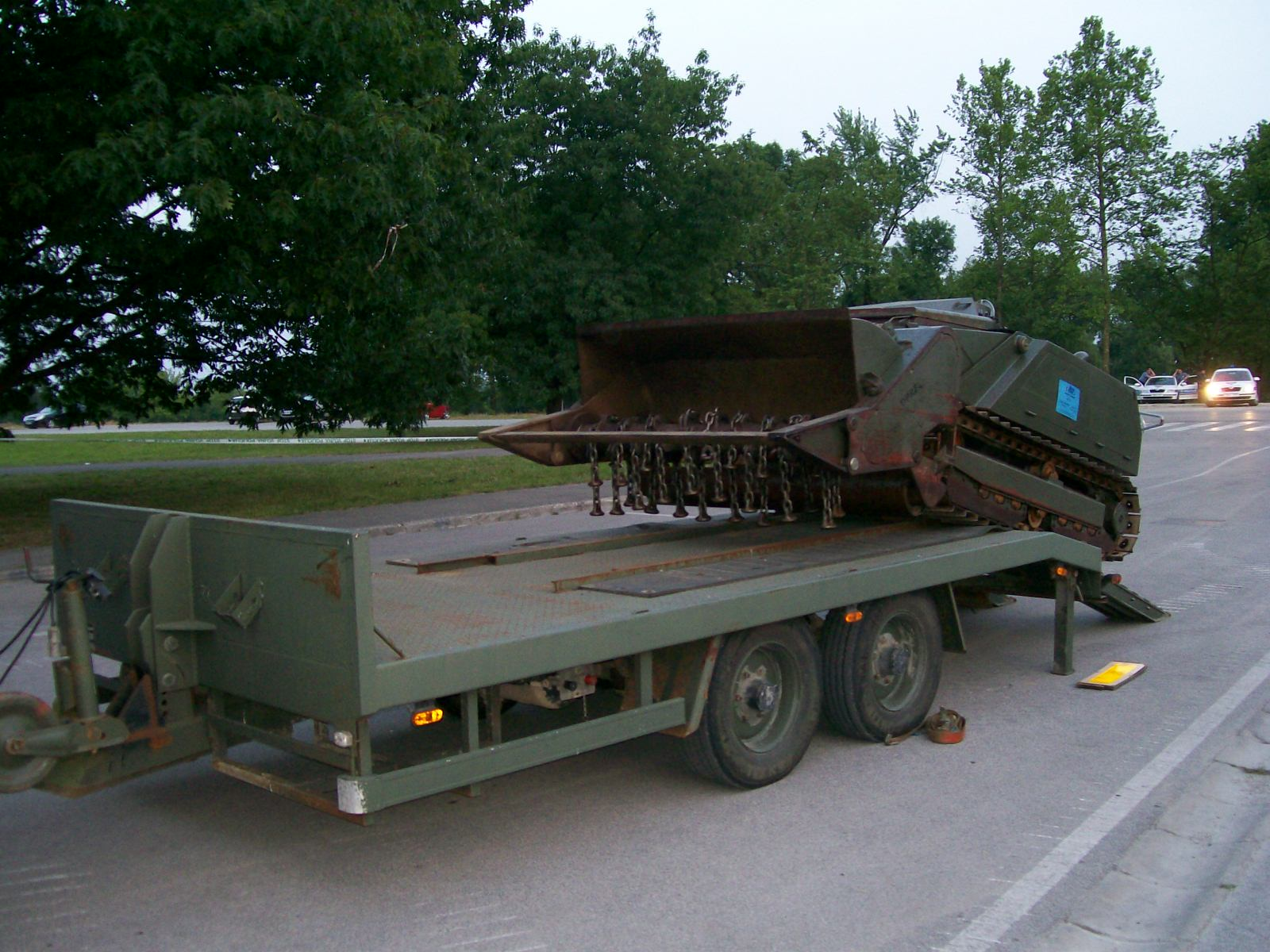 Stroj za razminiranje